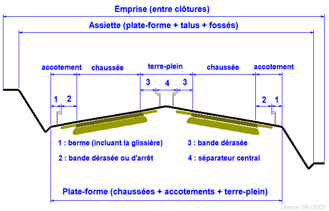 coupe-type de voirie